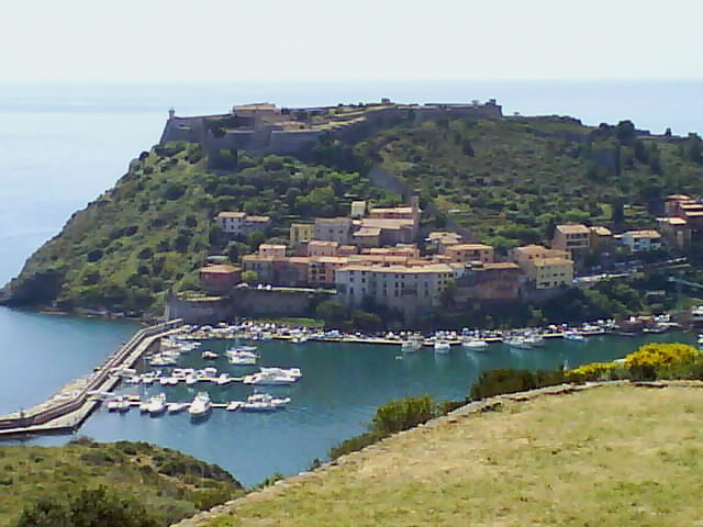 Panorama del borgo di Porto Ercole